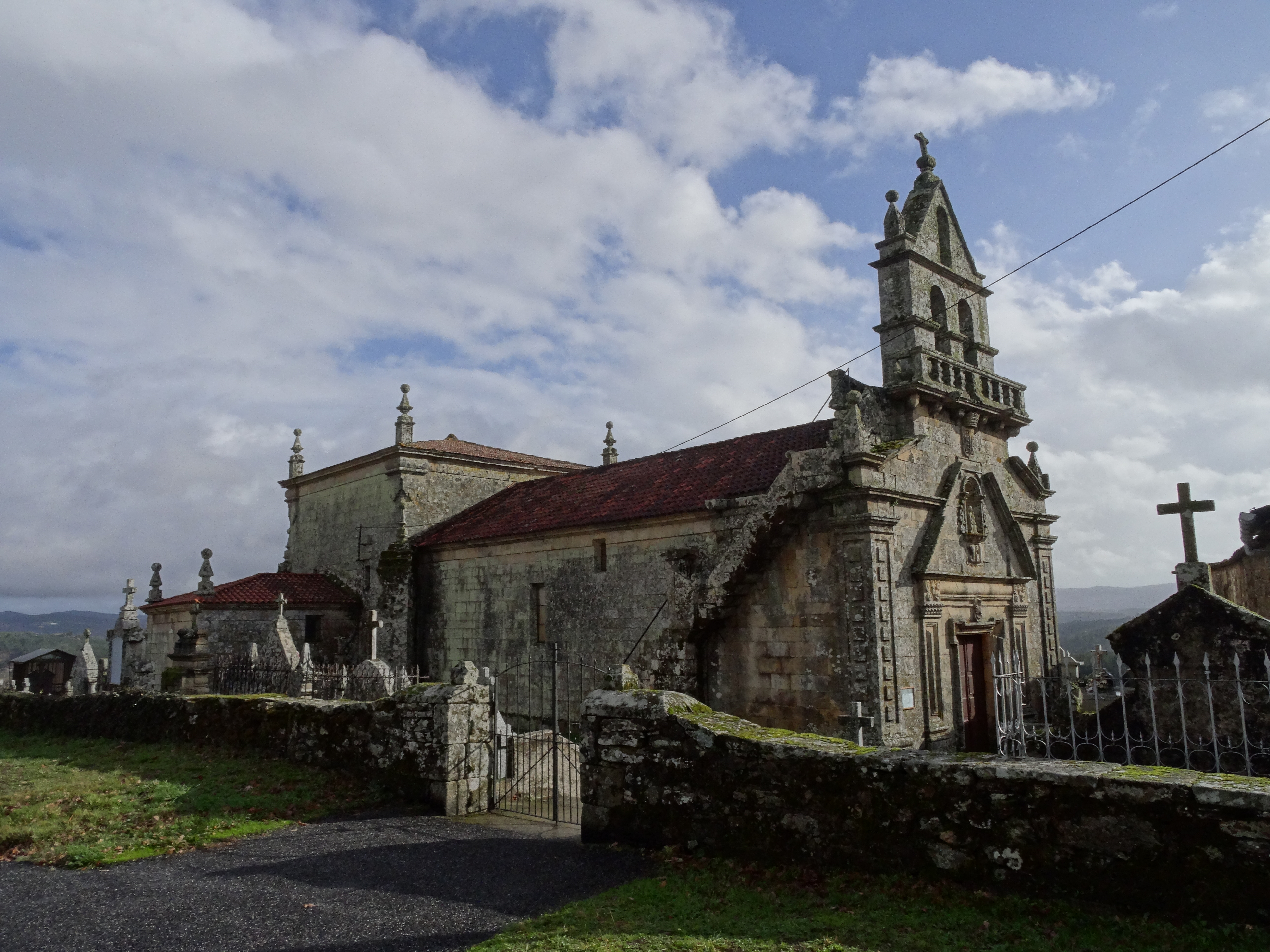 Ver título.